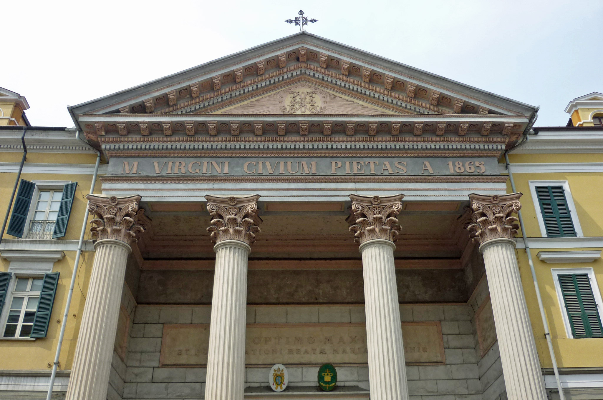 Kathedrale Santa Maria del Bosco von Cuneo